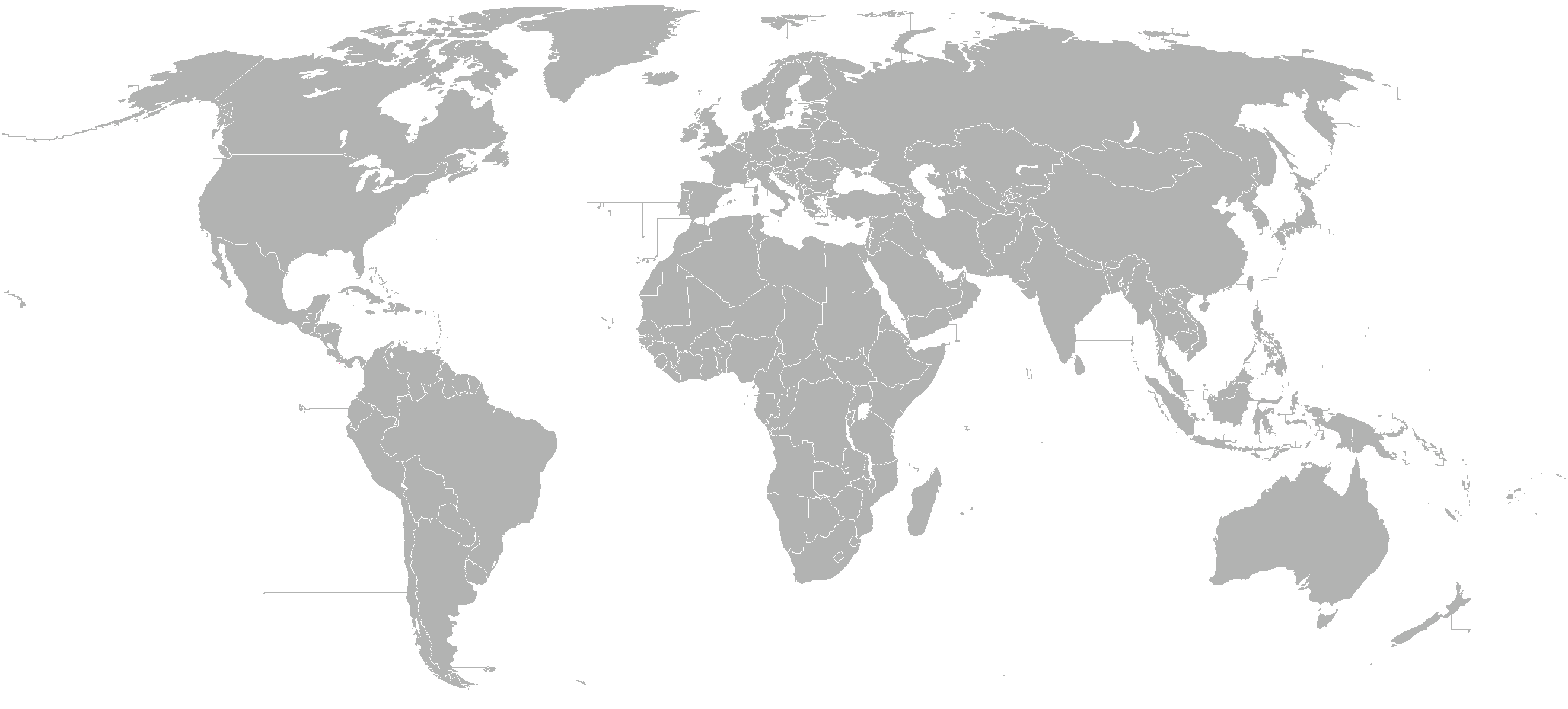 Mapamundi politico